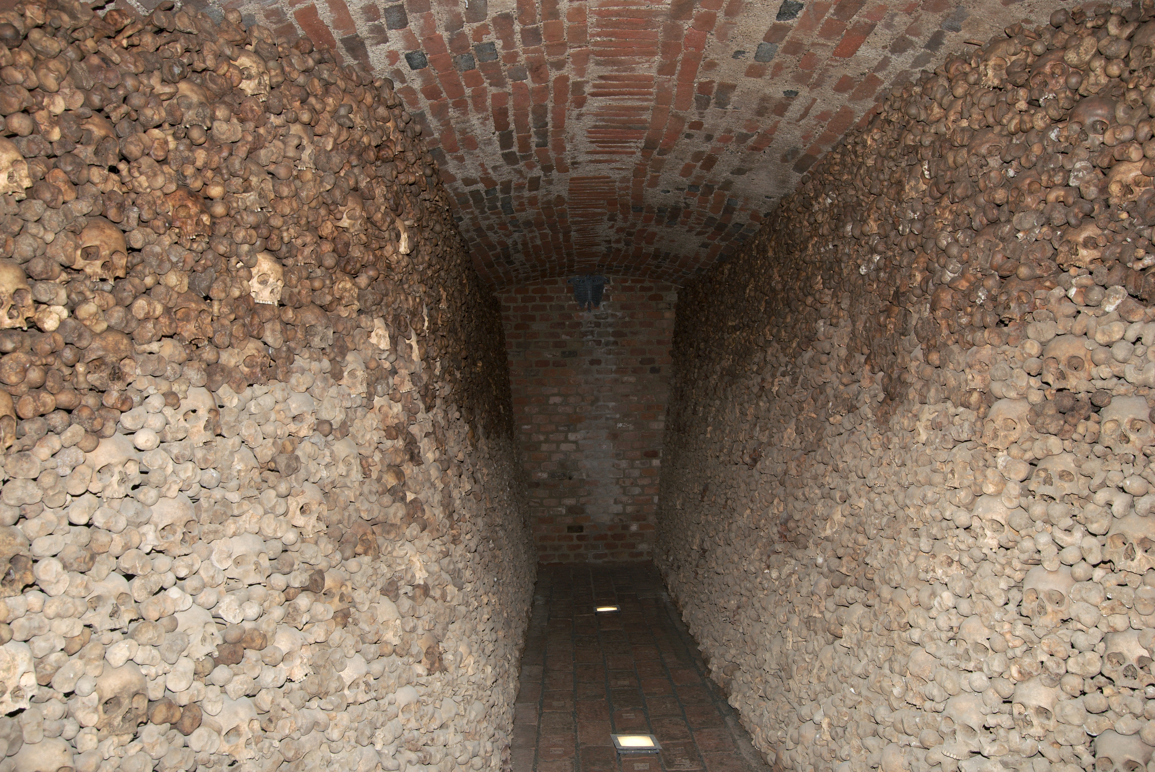 Česky: Kostnice pod brněnským kostelem sv. Jakuba